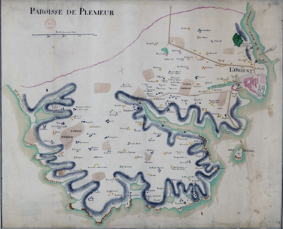 Carte de la paroisse de Plémeur (Ploemeur) datant du XVIIIe siècle (auteur inconnu)